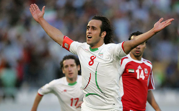 شادی پس از گل کریمی مقابل امارات / ایران ۱ - امارات ۰ / انتخابی جام جهانی ۲۰۱۰ / خرداد ۱۳۸۸